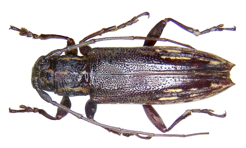 Familie: Cerambycidae Fundort: Philippinen, Mindanao, Surigao Coll. Museum Dresden Photo: U.Schmidt, 2007